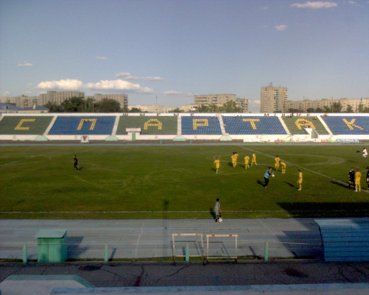 Стадион ФК "Спартак" (Семей)